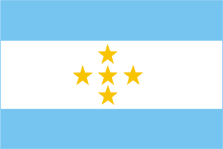 Bandera del Front d'alliberament de Polinèsia (Tavini-Huiraatira). Aquesta bandera servira en el seu cas per l'estat independent de Maohi (Polinèsia)